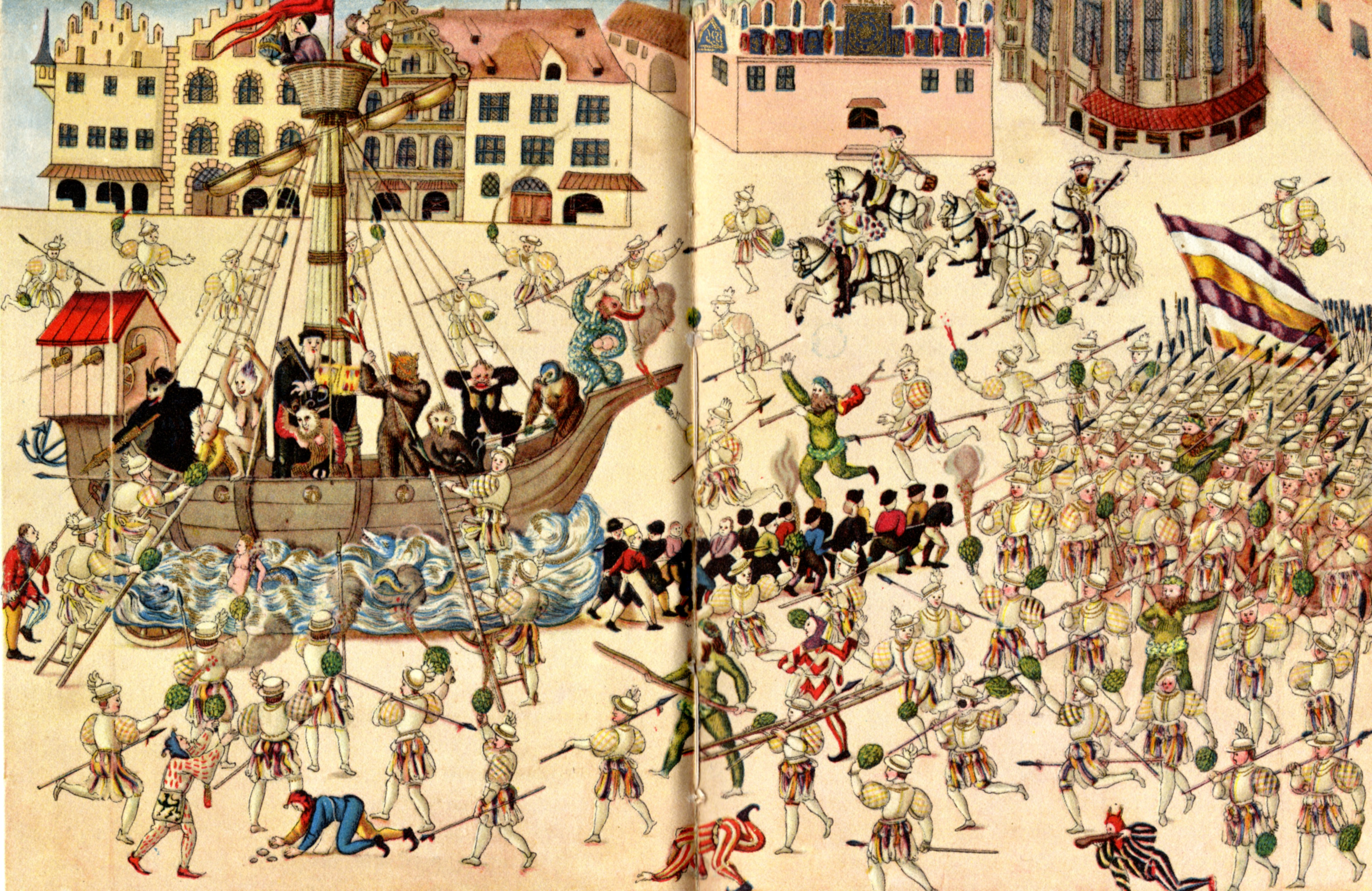 Vom Schembartlaufen. Hrsg. von Fritz Brüggemann. Leipzig: Bibliographisches Institut, 1936. Der Sturm auf die Schembarthölle des Jahres 1539. Schembartbuch der Pickertschen Sammlung. Handschrift, Nürnberger Stadtbibliothek, Nor. K. 444